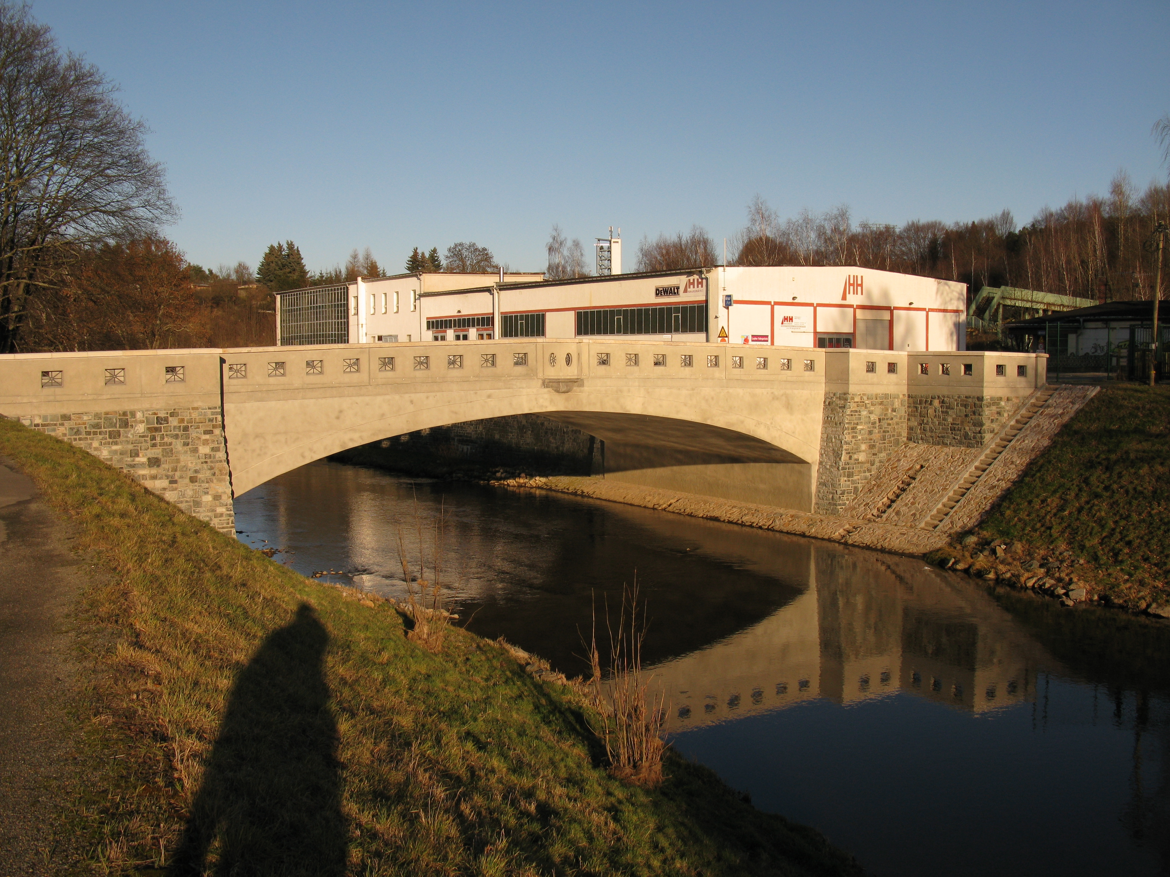 Plauen, denkmalgeschützte Brücke über die Weiße Elster am Hammerplatz)